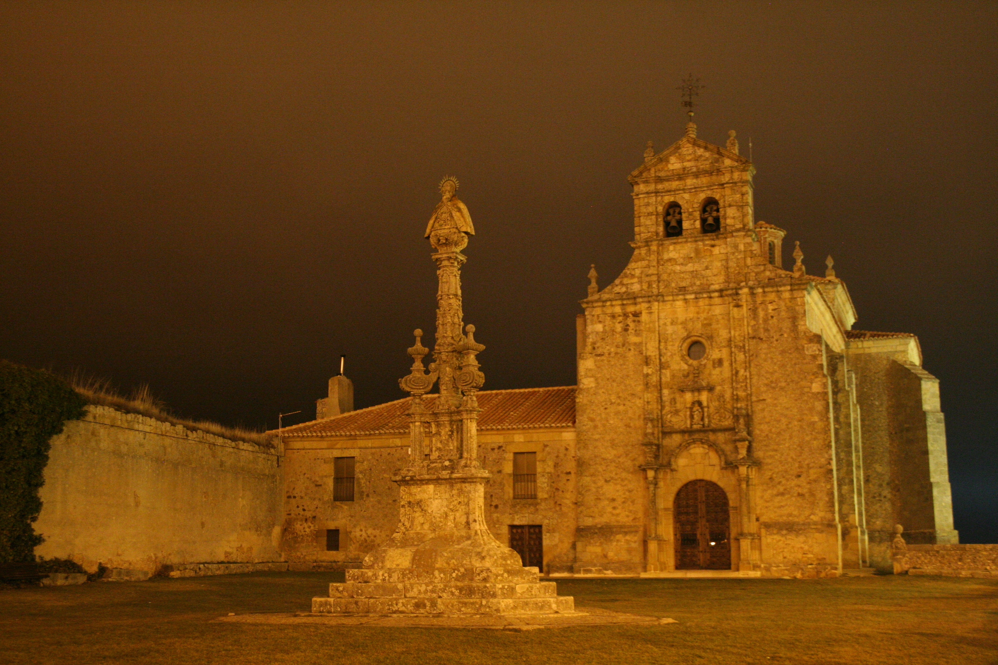 Ermita El Mirón, en Soria, España.